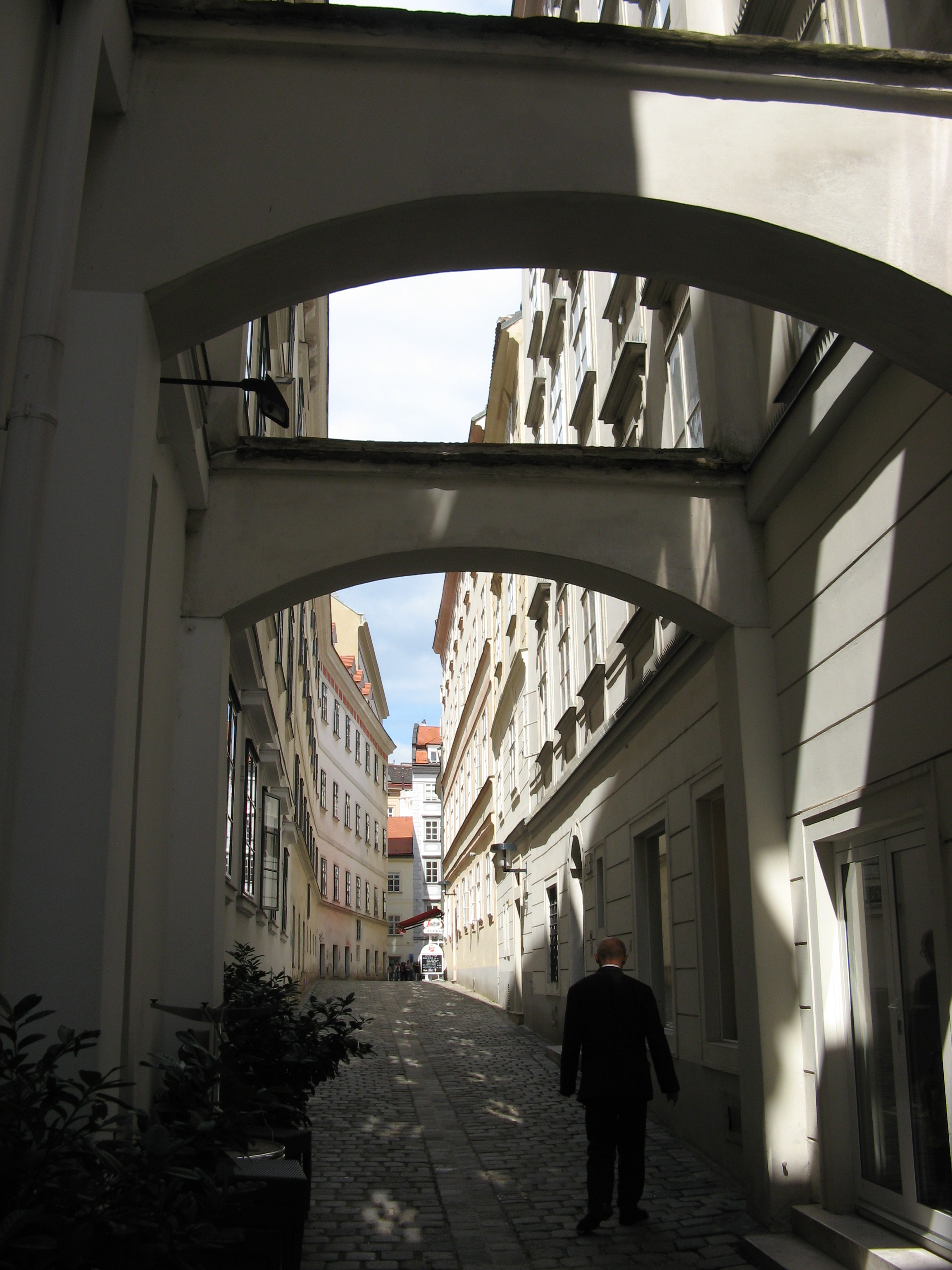 Blutgasse nach Norden, Wien-Innere Stadt